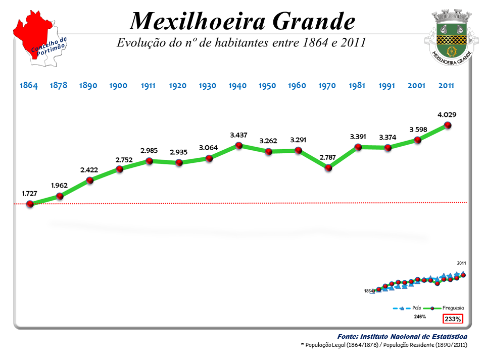 Censos 1864/2011